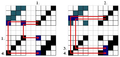 Kirjakorra siduse märkimine